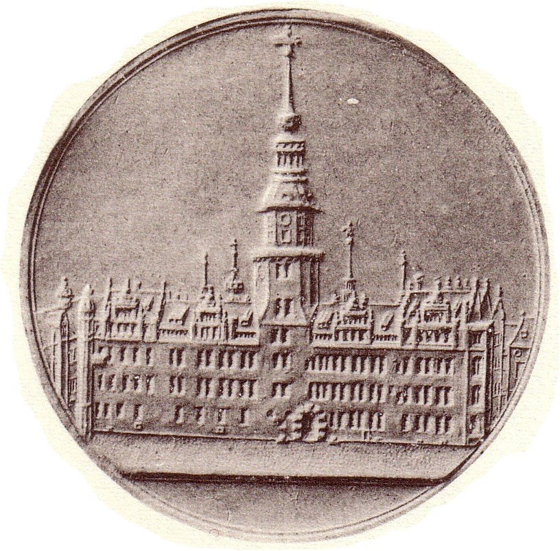 Medaille 1667 von Dürr und Omeis, Residenzschloss Dresden